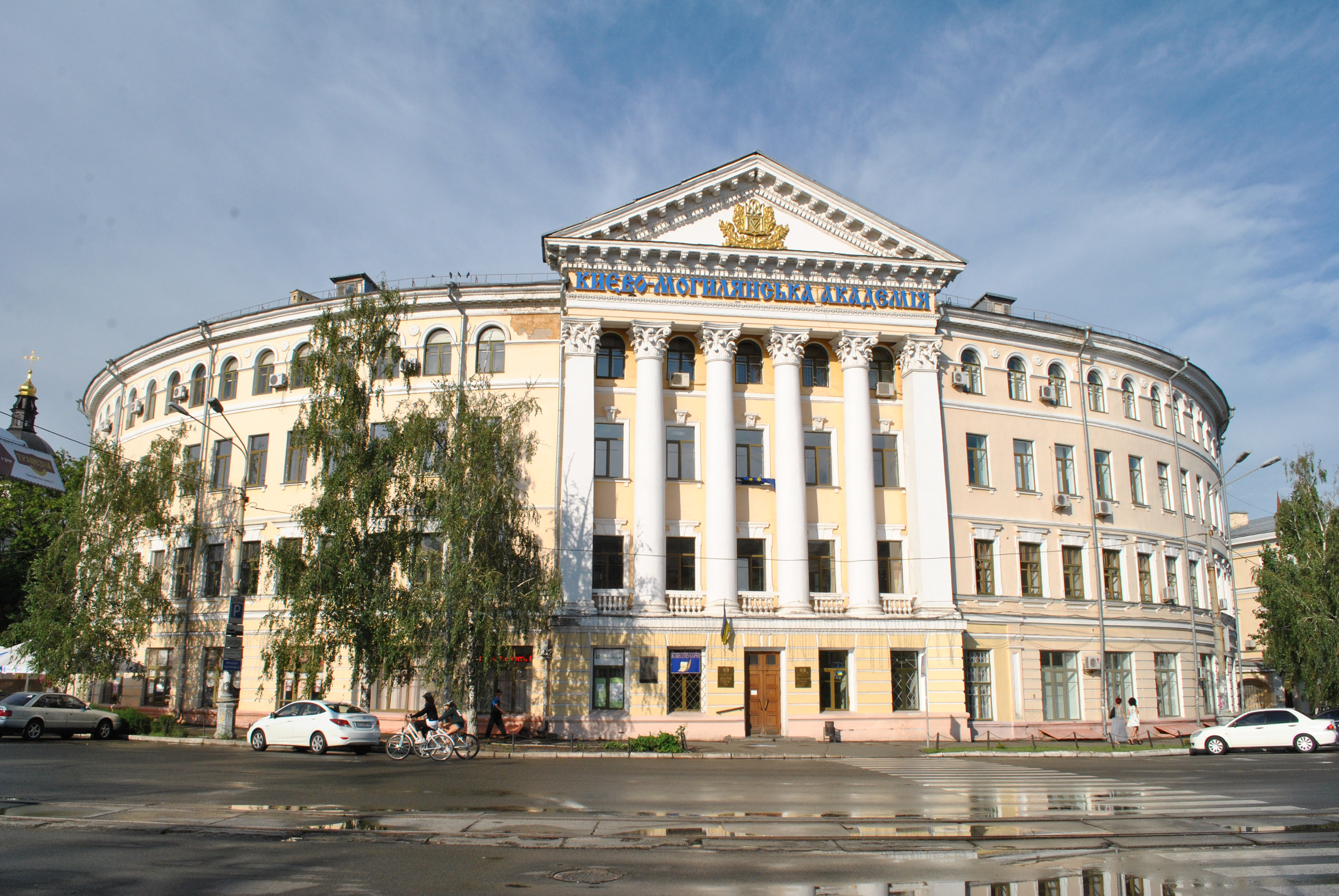 Будинок з крамницями, в якому у 1941 р. містився штаб Дніпровської військової флотилії, Київ, Контрактова пл., 3